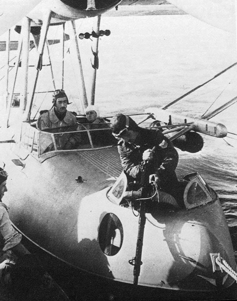 CRDA Cant. Cant Z.501 "Gabbiano" postazione mitragliere